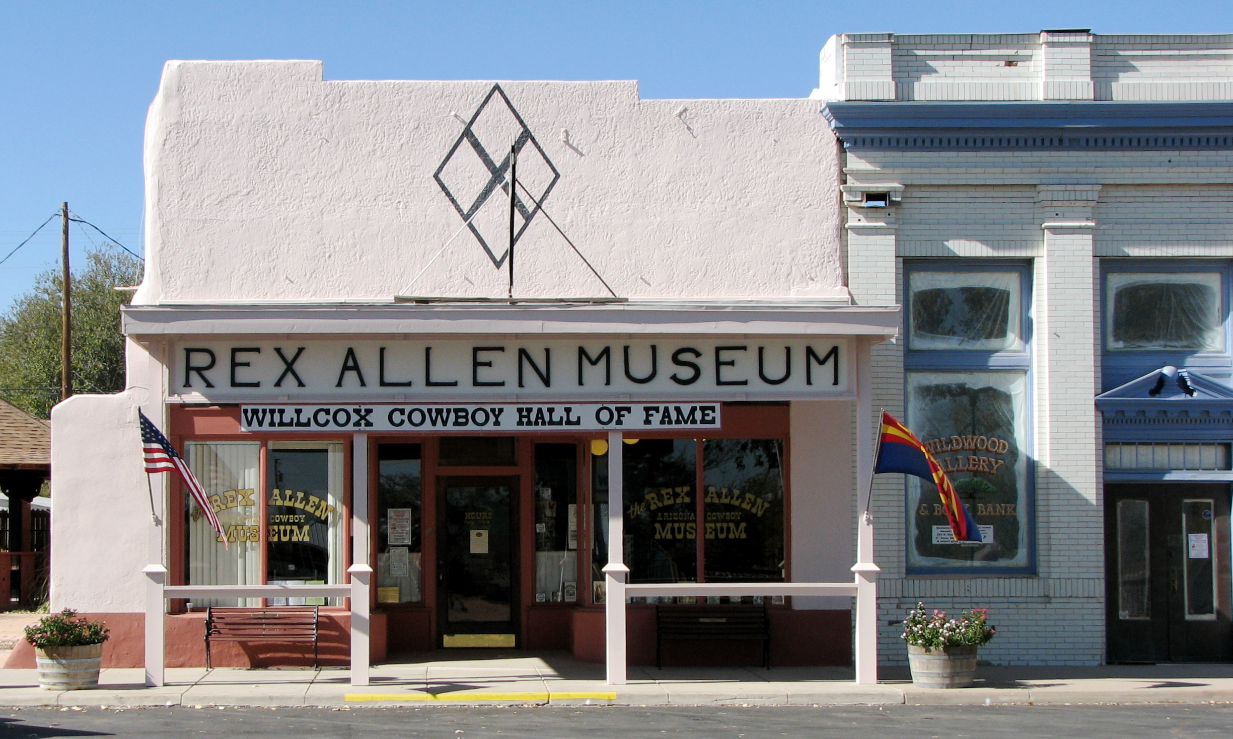 Rex Allen Museum in Willcox, Arizona.